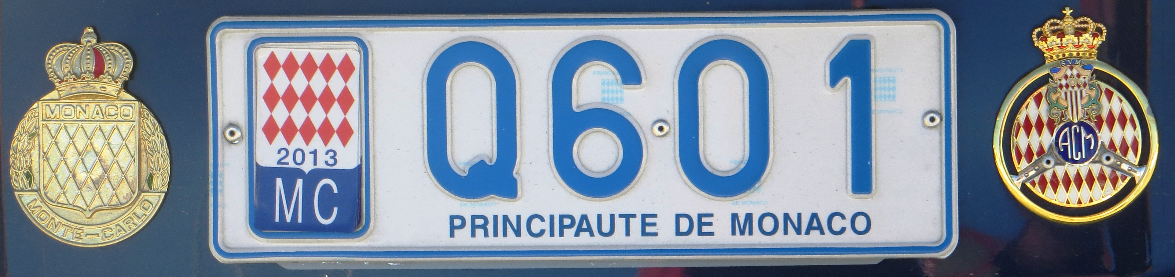 kentekenplaat Mnaco